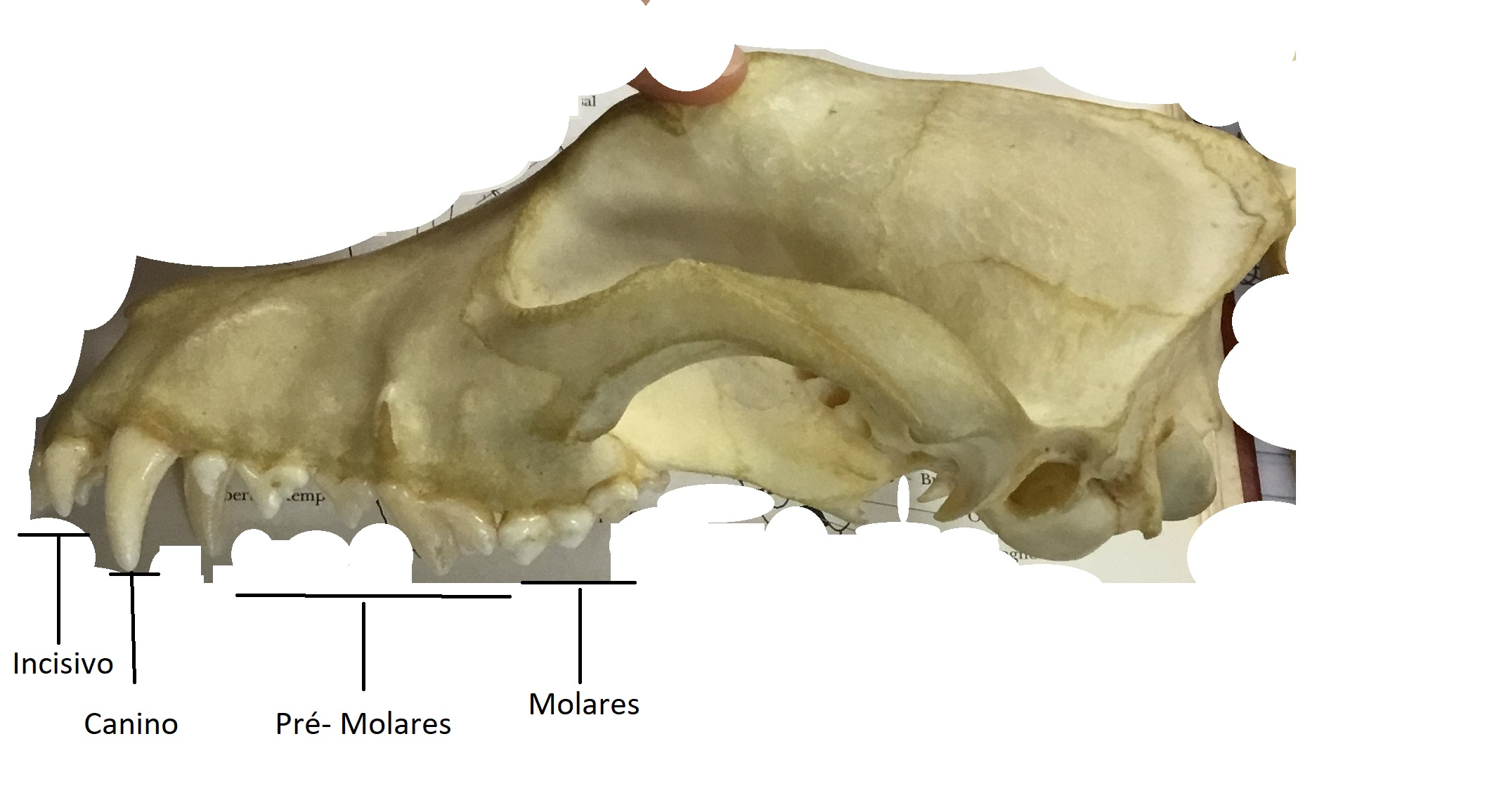 Crânio de Canis Familiaris. Foto tirada no Instituto de Biociências da Universidade de São Paulo.